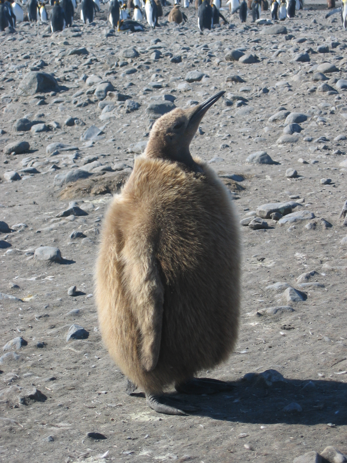 juvenile Aptenodytes patagonicus before startung his moult/ Beschreibung: Jugendlicher Aptenodytes patagonicus vor der Mauser zum Erwachsenengefieder